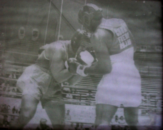 Panamericano